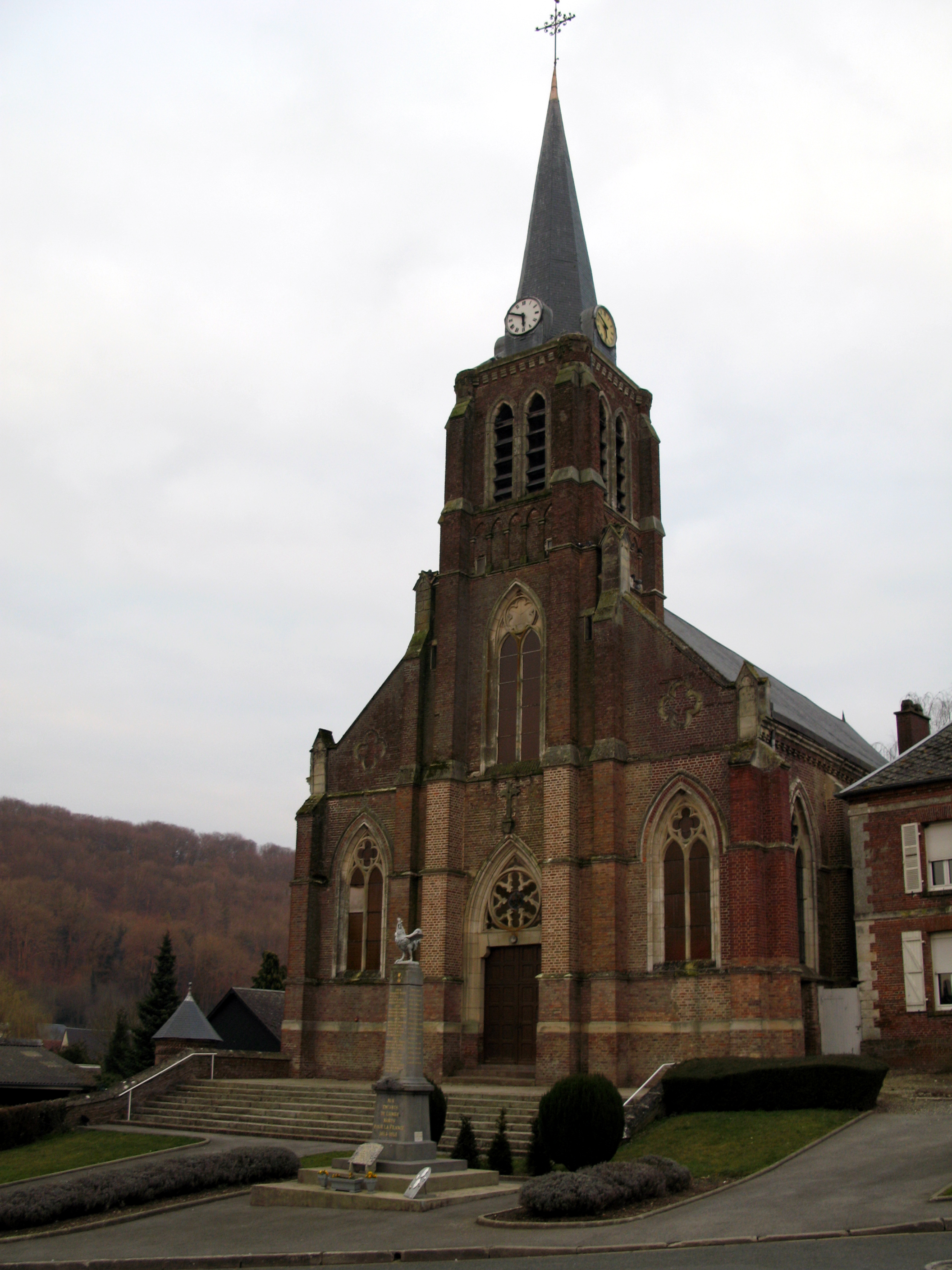 Liomer (Somme, France) - L'église et le Monument-aux-Morts. . .